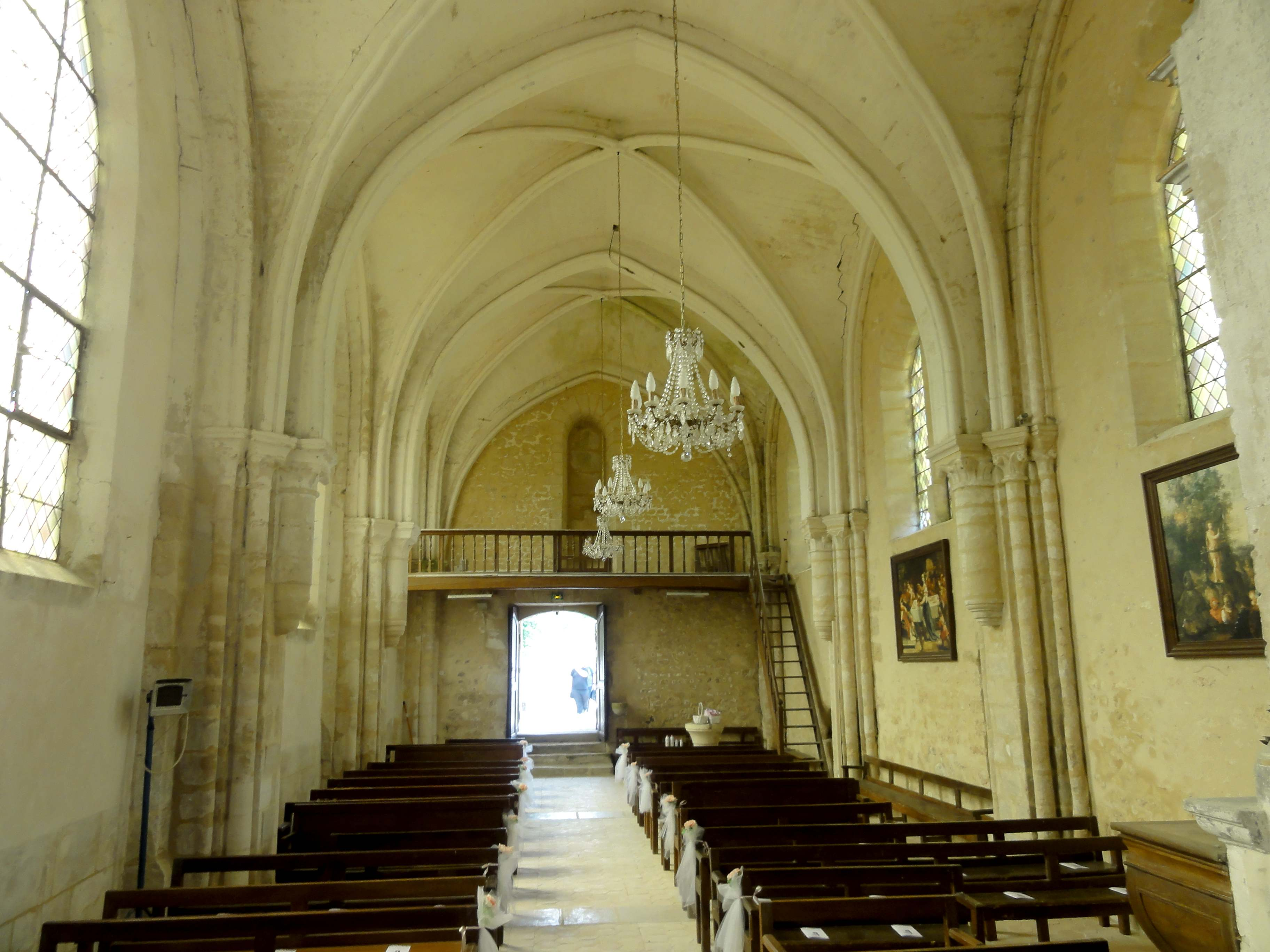 Intérieur de l'église (voir titre).